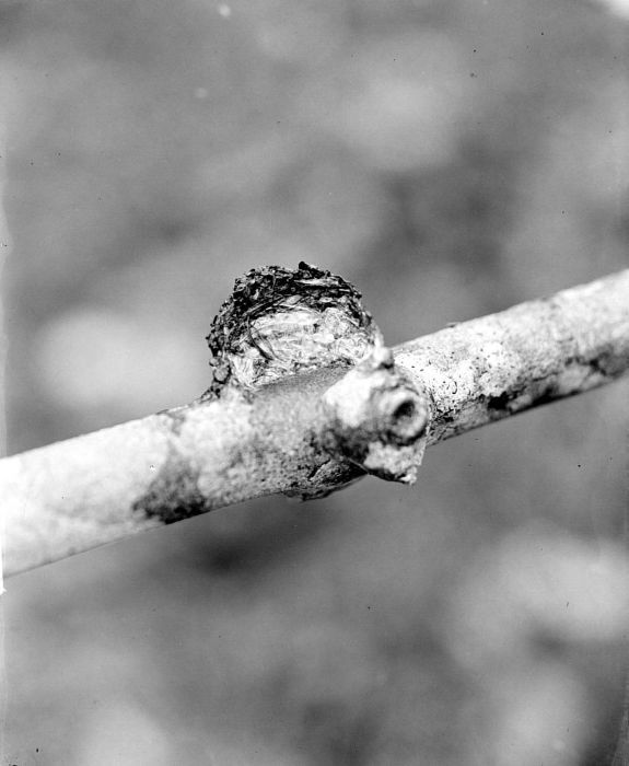 Negatief. Een nest van de boomgierzwaluw (lajang poetih) op een rubberstam van bovenaf gezien, Borneo